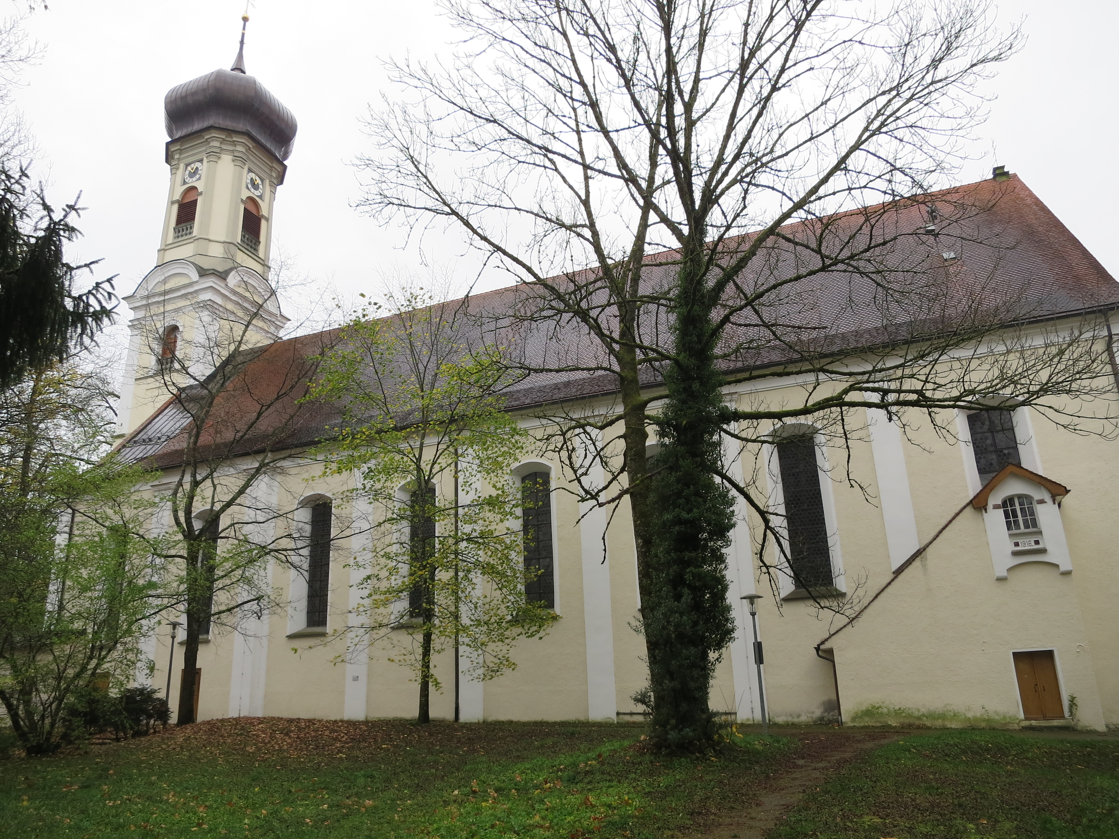 Langschiff der barocken Hallenkirche mit Zwiebelturm